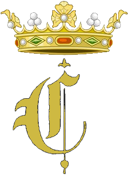 Escudo de los Marqueses de Casinas